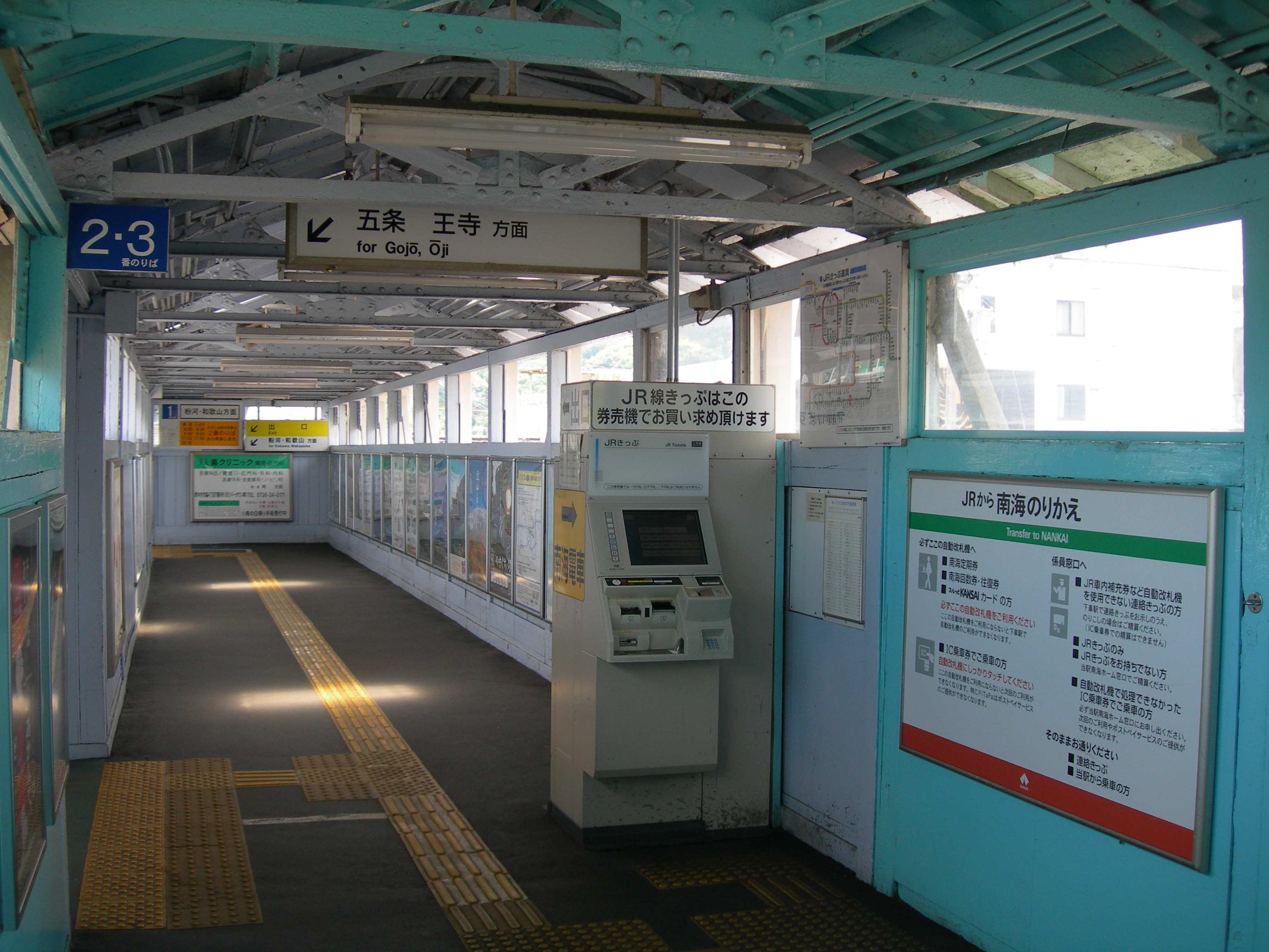 橋本駅 (和歌山県)跨線橋の通路にある簡易券売機